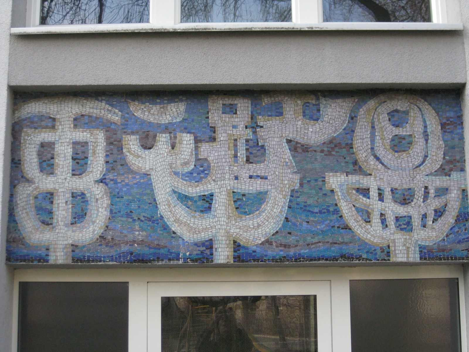 Josef Baldermann-Hof in Wien Brigittenau - Hauszeichenmosaik von Herbert Tasquil, Pasettistraße 9-21 Stg. 4. This media shows the Vienna residential building (Gemeindebau) with the ID 1433.